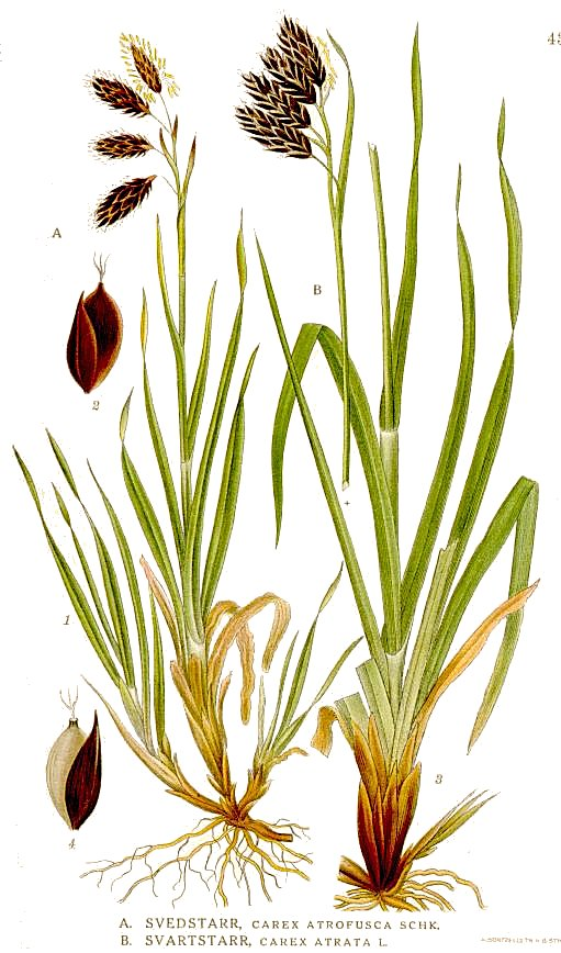 A. Carex atrofusca Schkur, B. Carex atrata L. Original Description A. Svedstarr, Carex atrofusca Schk. B. Svartstarr, Carex atrata L.